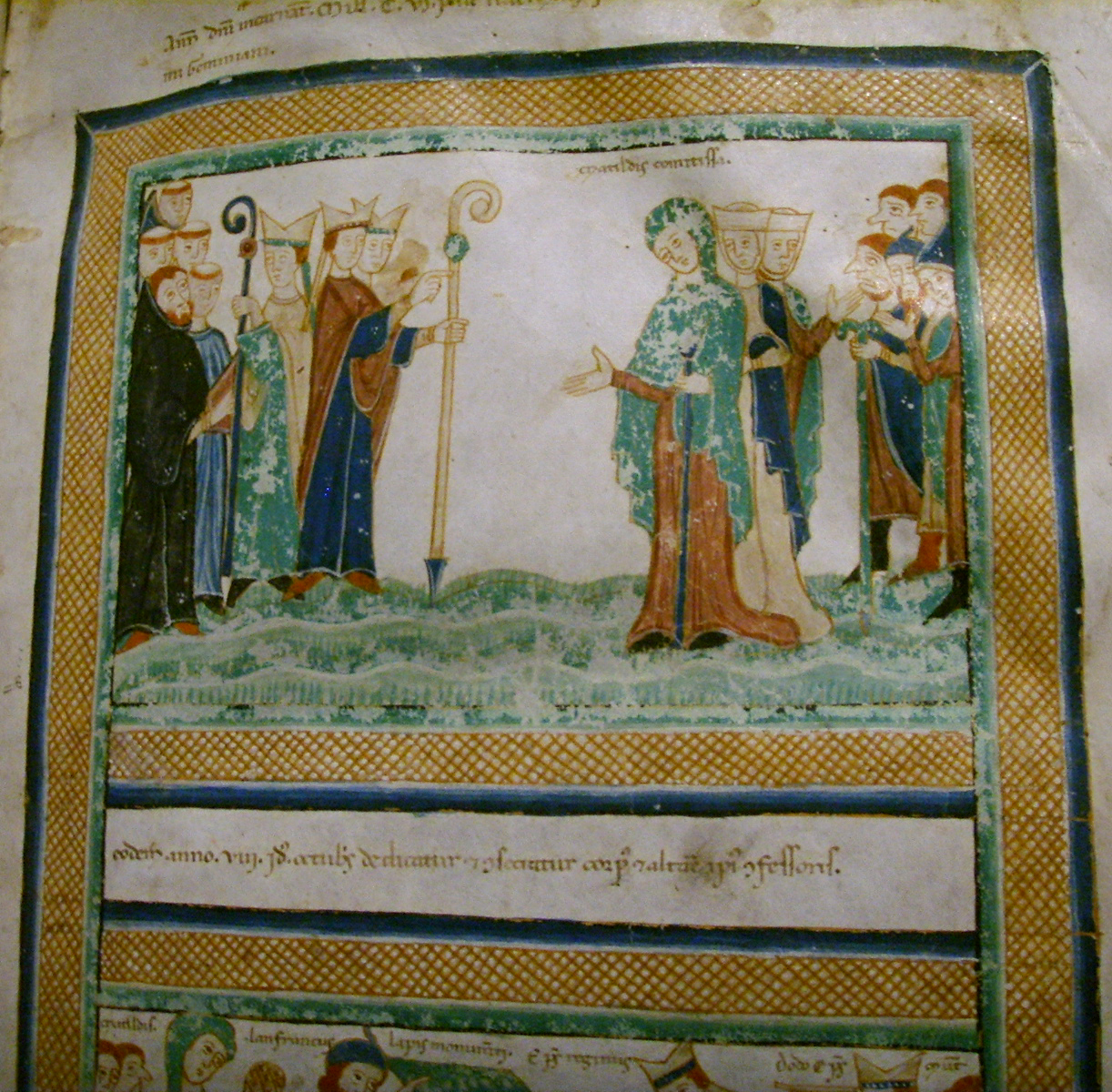 Modena, archivio capitolare, relatio de innovation ecclesia sncti geminiani, ms. O.II.11, inizio XII sec., matilde di cvanossa va incontro al vescovo